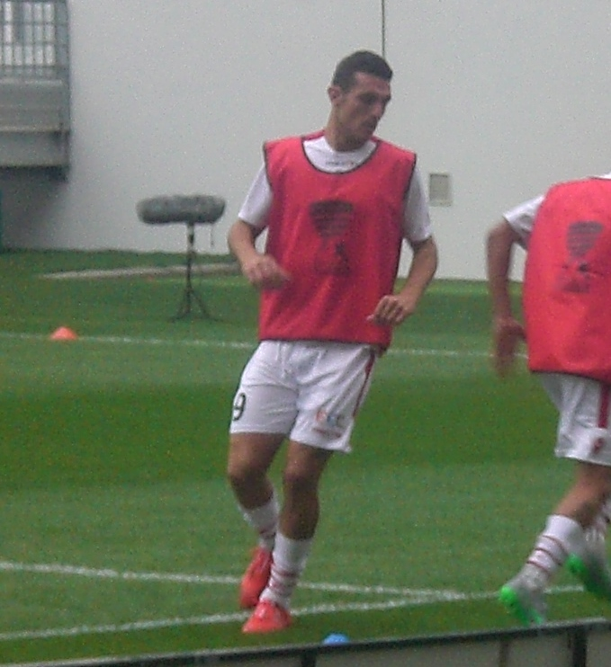 Nicolas Fauvergne avant le match Lens / AC Ajaccio, le 11 août 2015, au Stade Bollaert-Delelis, comptant pour le premier tour de la Coupe de la Ligue française de football.